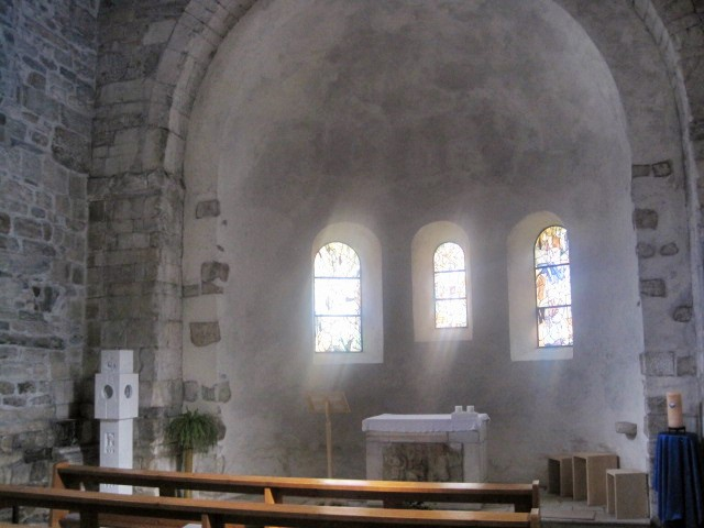 Pfarrkirche in Laas